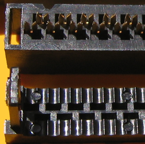 Flachkabelschneidklemmenverbinder